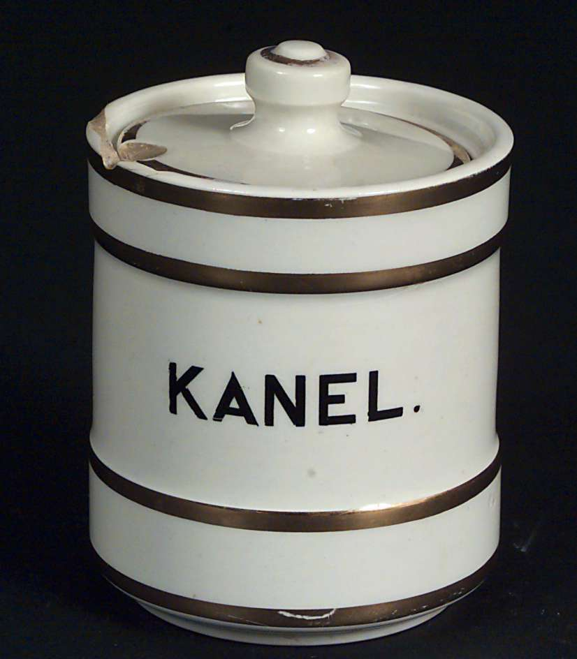 Krydderkrukke i keramikk med lokk, produsert på Egersunds Fayancefabrik. Høyde 9,5 cm. Foto Anne Lise Reinsfelt / Norsk Folkemuseum, NF.1971-0061AB